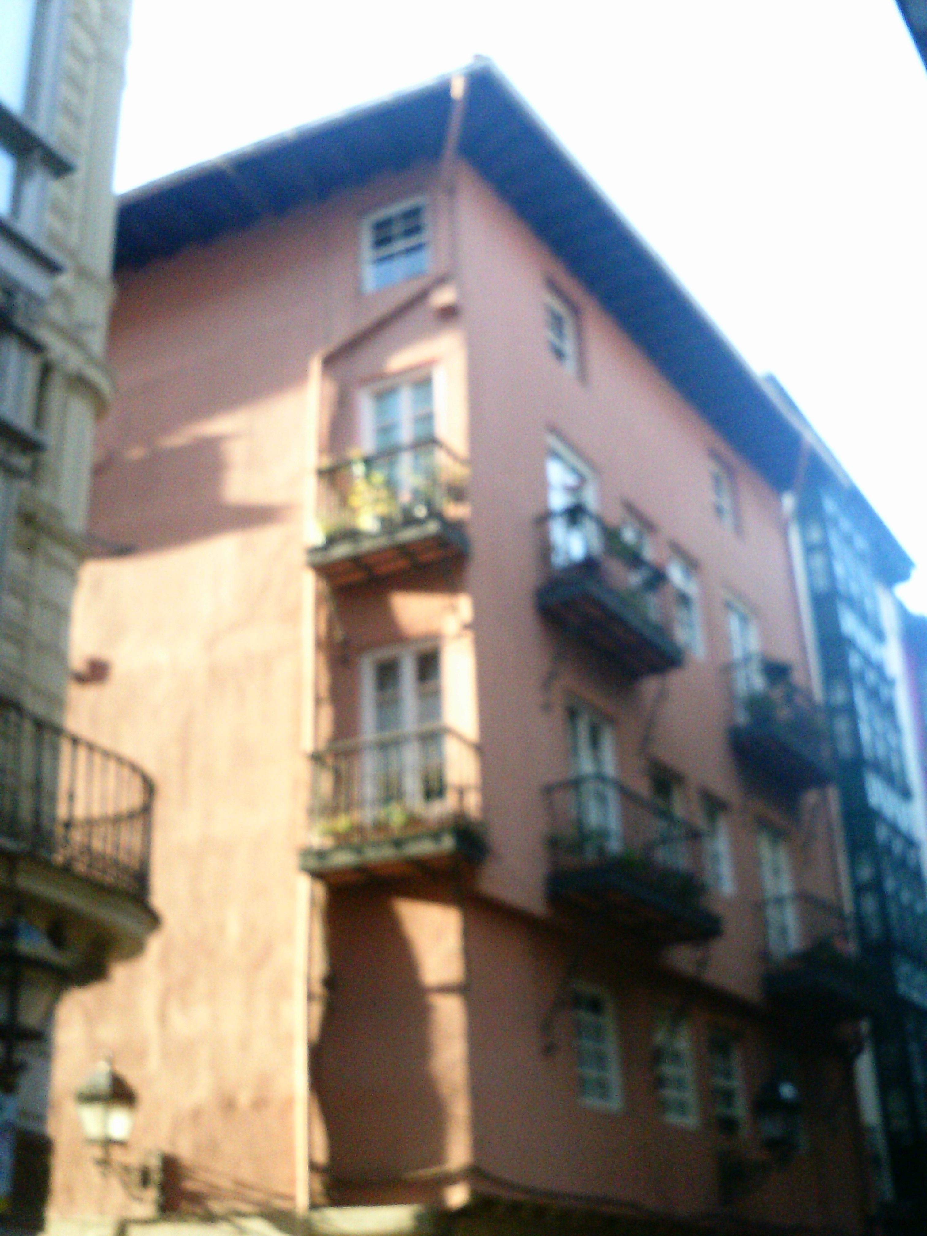 Rosa etxea (Bidebarrieta, 10)